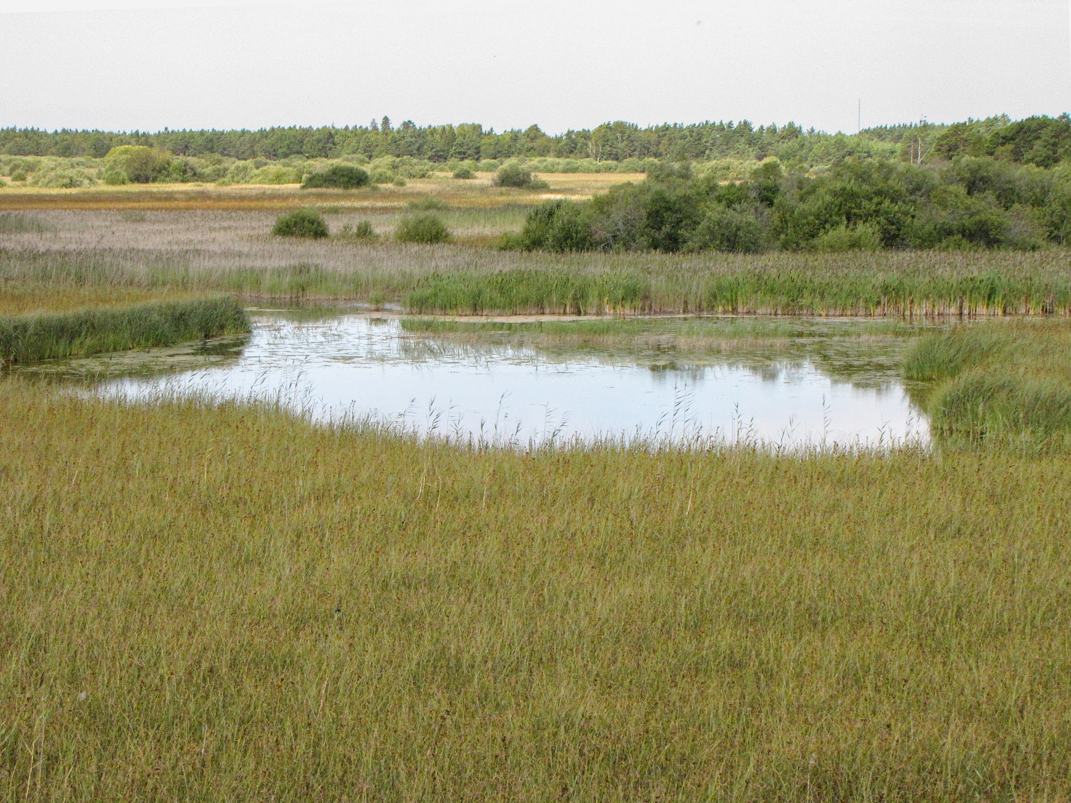 Mitt i agmyren Träskmyr ligger sjön Gardträsk